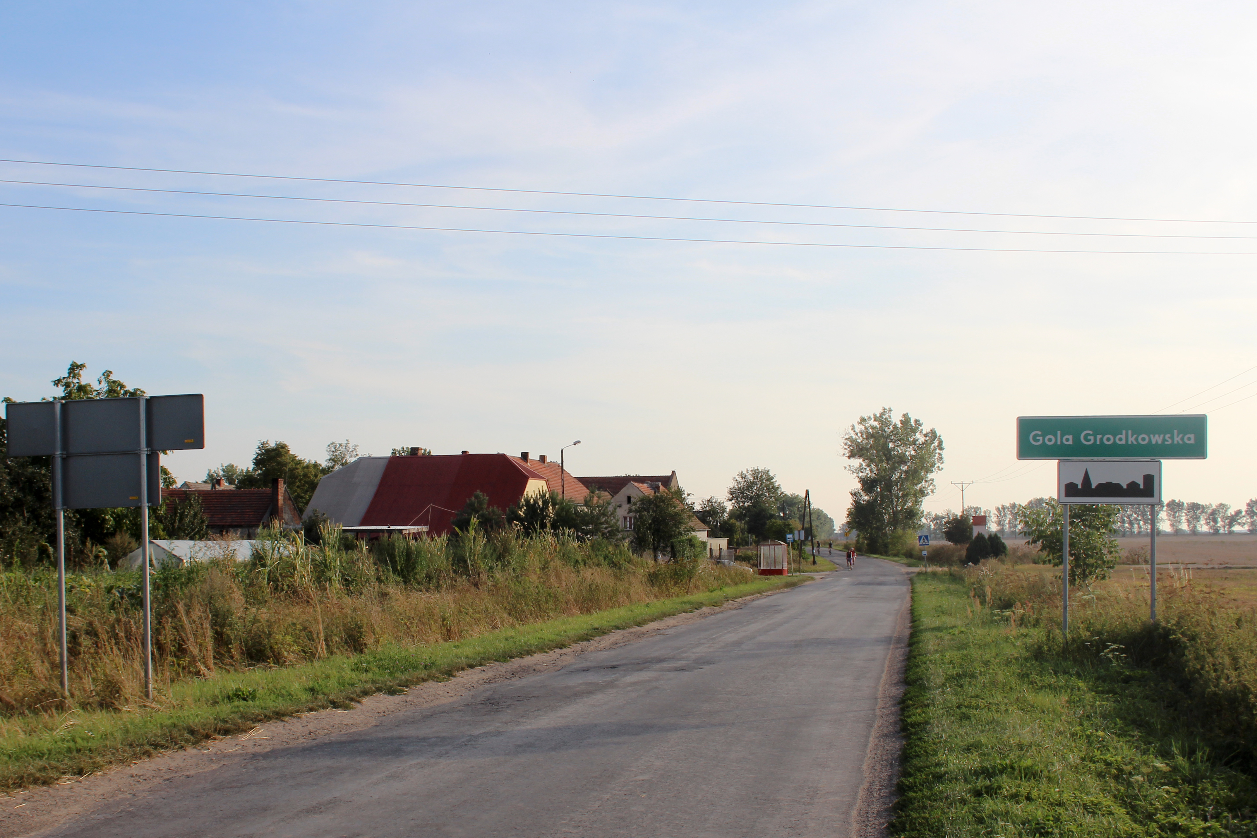 Gola Grodkowska - wieś w Polsce w województwie opolskim, w powiecie brzeskim w gminie Grodków.